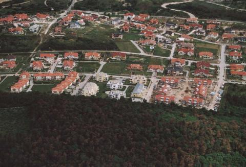 Üröm, Hungary, aerialphotgraphy